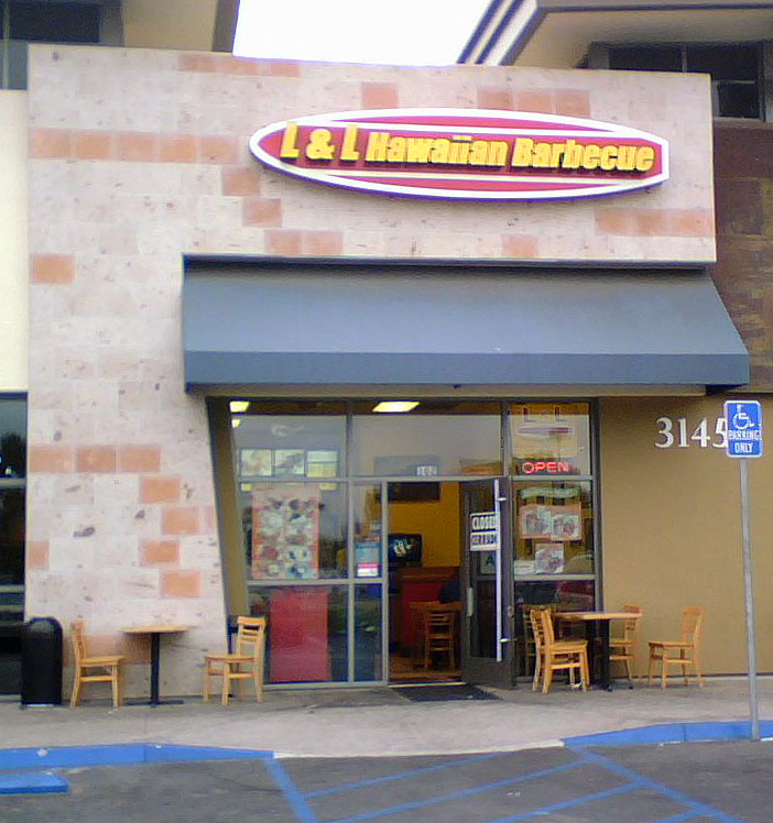 L&L Hawaiian Barbecue restaurant in San Diego, California